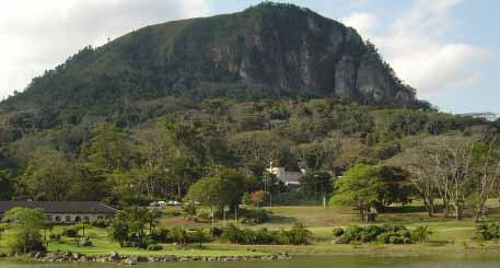 Леопард Рок Хотел, Зимбабве, Аутор Радован Корда, Објављено по изричитом одобрењу аутора